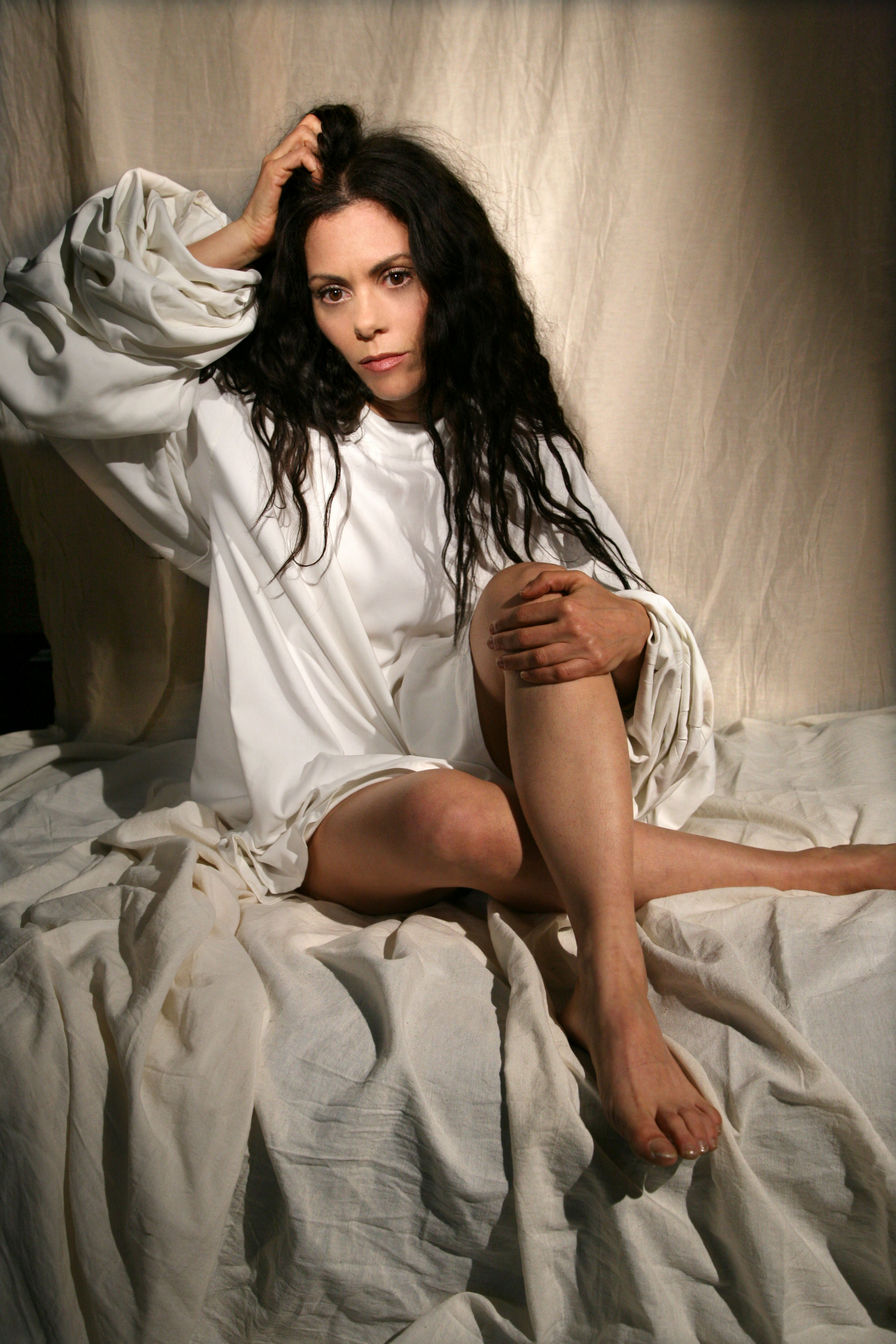 מיקי פלג-רוטשטיין בתפקיד ויויאן בהצגה "משוגעת"